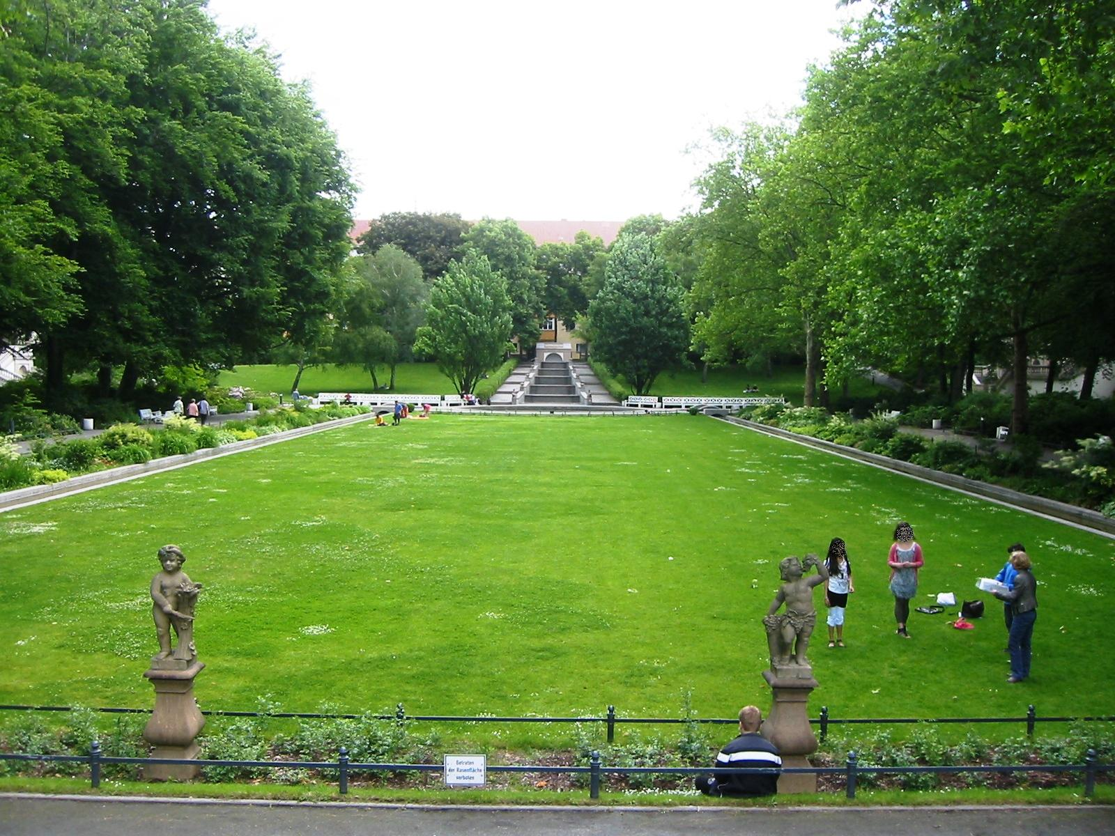 Blick von der Orangerie auf die Wassertreppe im Körnerpark in Berlin-Neukölln